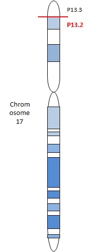 Description du chromosome portant l'information génétique codant les récepteurs TRPV1